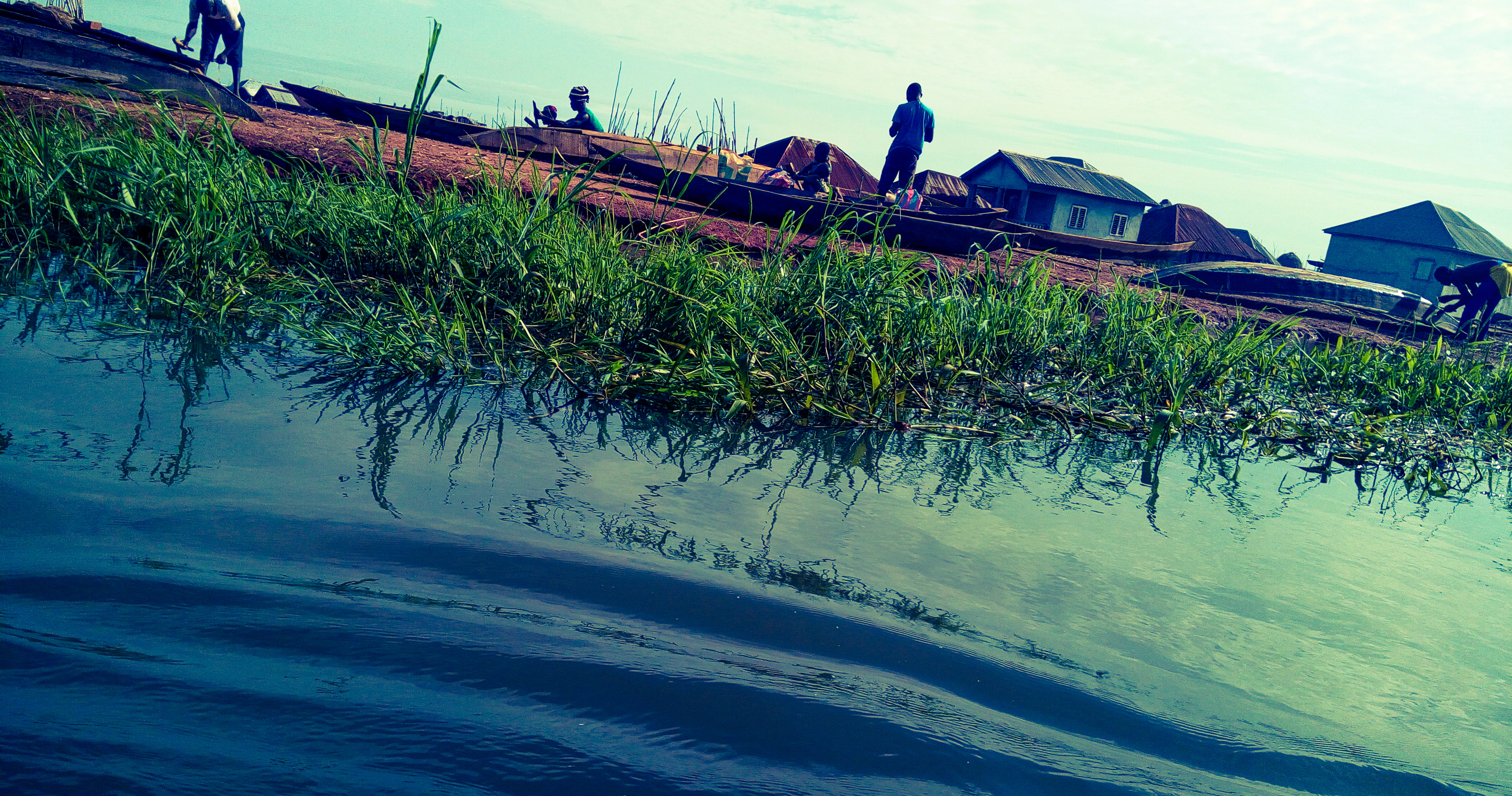 C'est une vue de paysage prise sur le fleuve Ouémé au couché du soleil dans la ville de Dangbo au village Hètin-Sota.